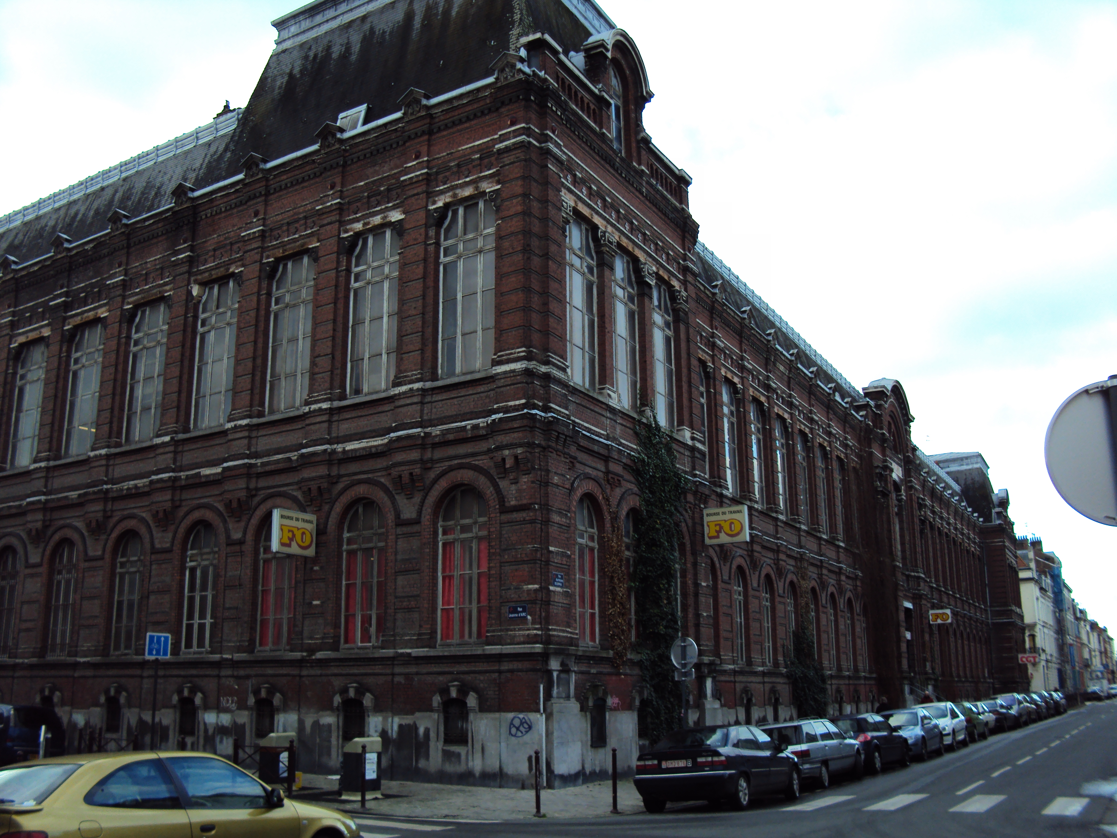 La Bourse du Travail de Lille ; photo prise de la rue Jeanne d'Arc.